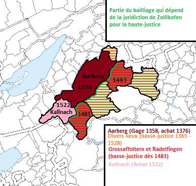 Carte du bailliage d'Aarberg. Le bailliage est agrandit de la seigneurie de Kallnach en 1521/1522.